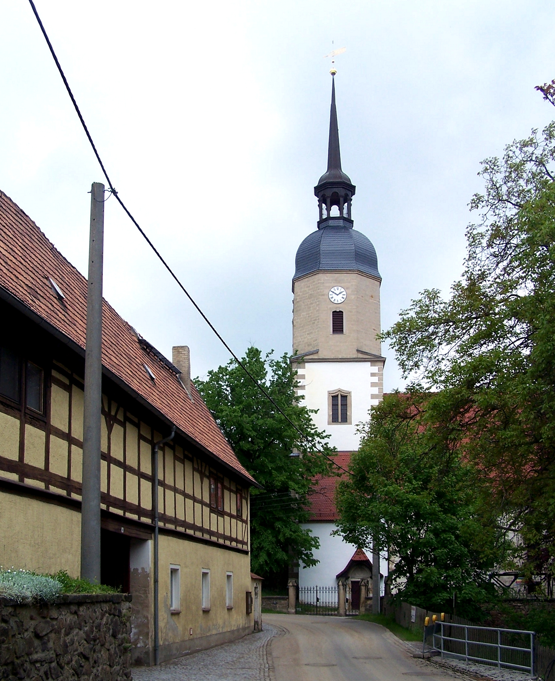 Kirche Weistropp, Gemeinde Klipphausen, Landkreis Meißen